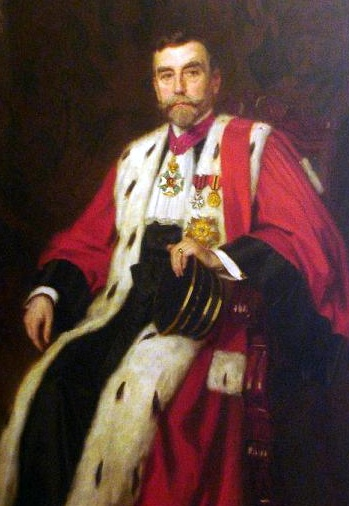 Voorzitter de la Kethulle de Ryhove. Eerste Voorzitter Hof van Beroep te Gent 1919 tot 1923, emeritaat; Baron Adrien louis Marie de la Kethulle de Ryhove. (Gent, 4 april 1851- Gent, maart 1933) doctor rechter 1872 attaché minister justitie 1873 Rechter eerste aanleg Gent 1885 Onderzoeksrechter 1868 Vice Voorzitter